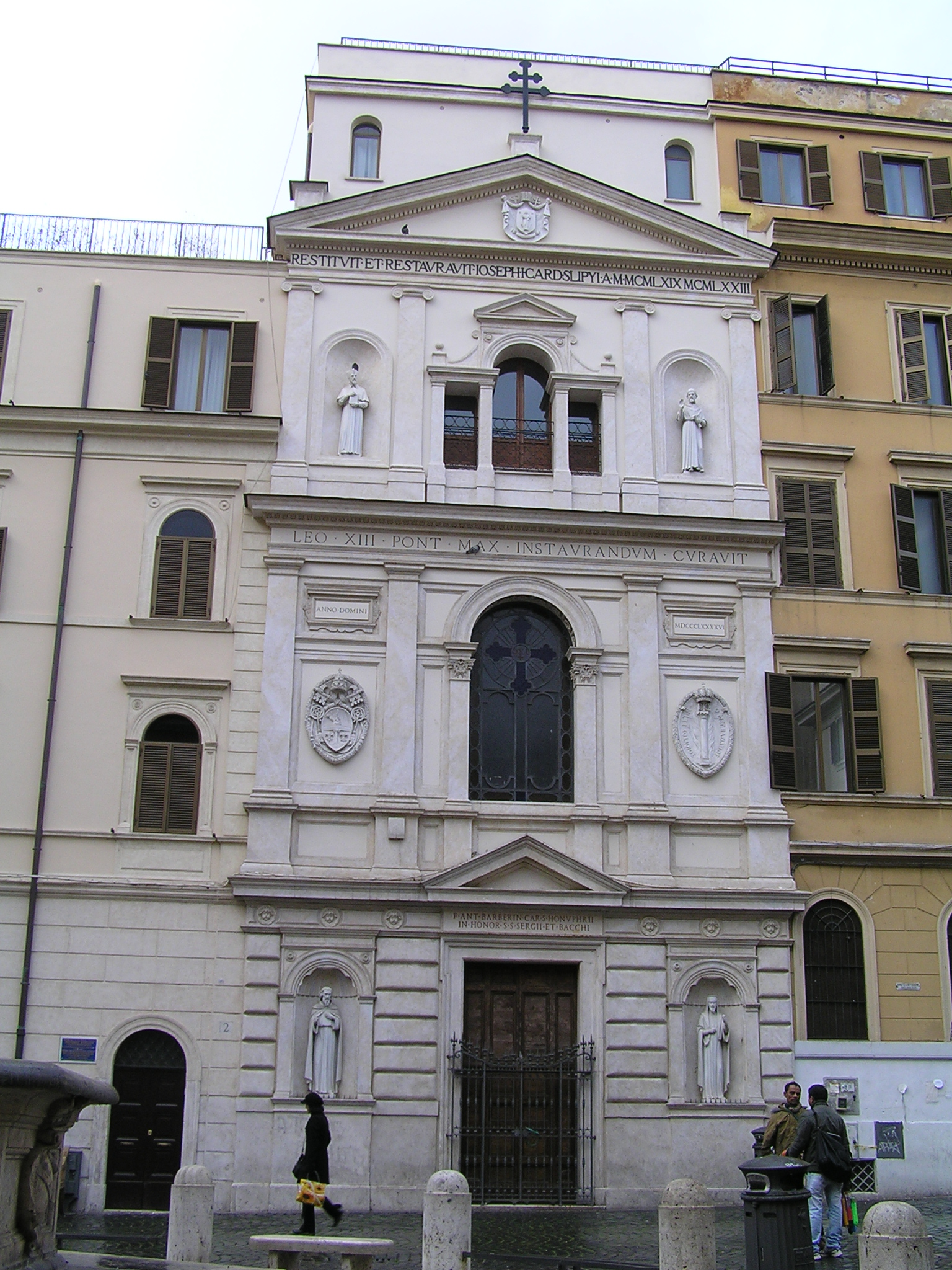 Церква Сергія і Вакха в Римі: Церква Сергія і Вакха в Римі